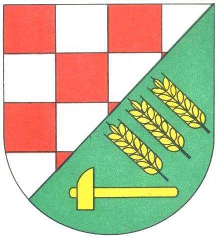 Wappen von Ellenberg (Rheinland-Pfalz)